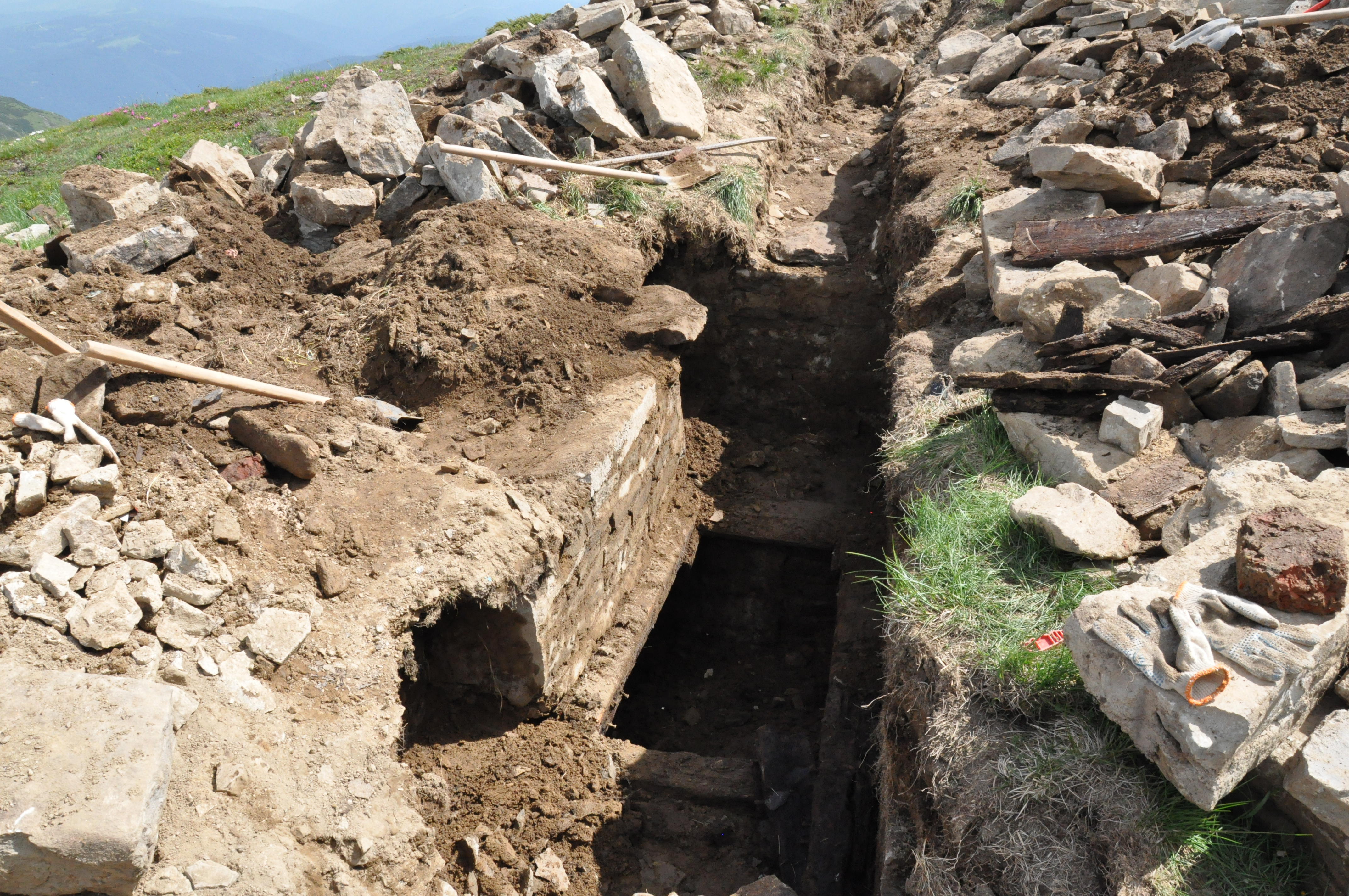 Відкопаний 22.06.2016. Засипаний перед початком будівництва мурів